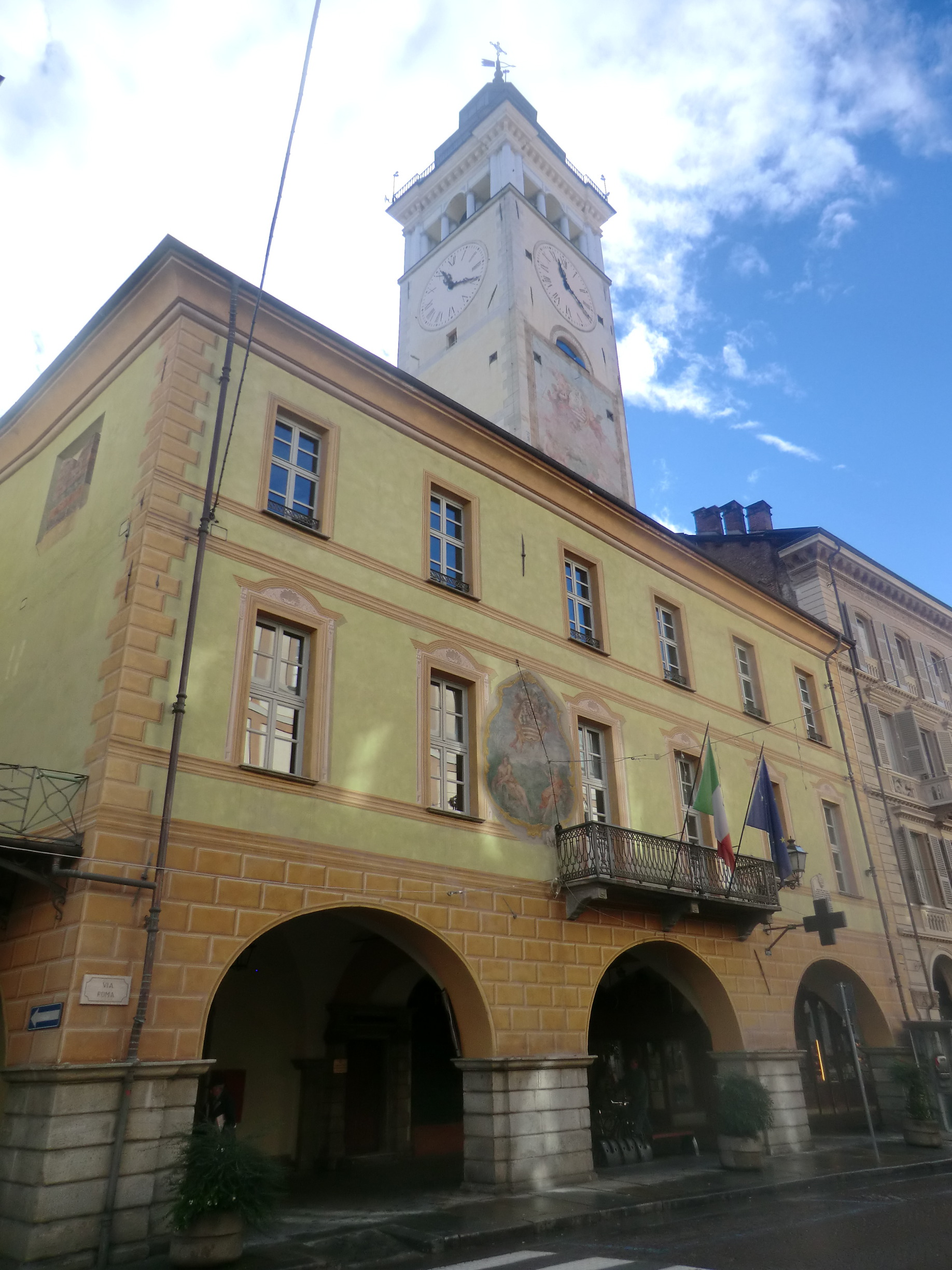 Cuneo: palazzo della Torre (sec XV) e torre civica (1317)